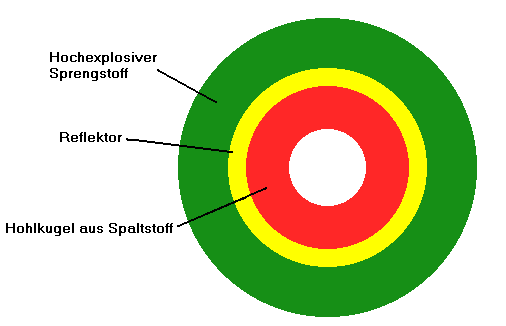 Implosionsbombe2